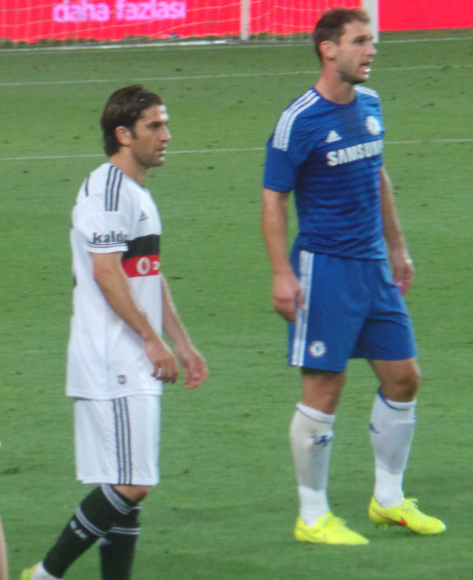 Uğur Boral & Branislav Ivanovic